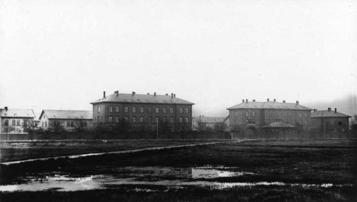 Artillerivejens Kaserne i København